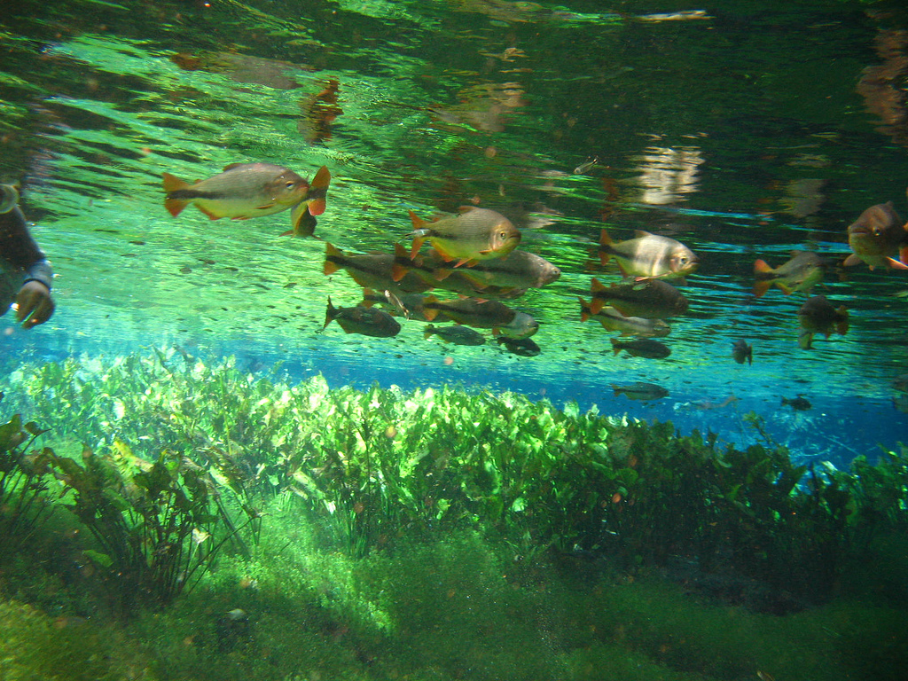 Bonito MS